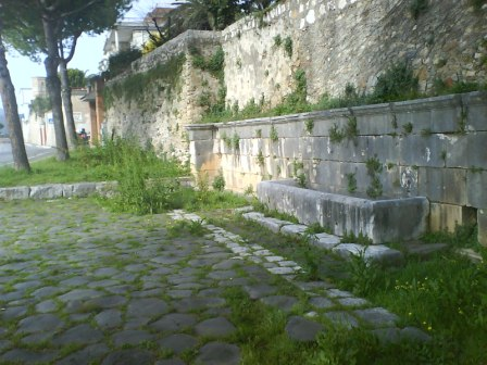 Formia: fontana di epoca romana sulla via Appia.